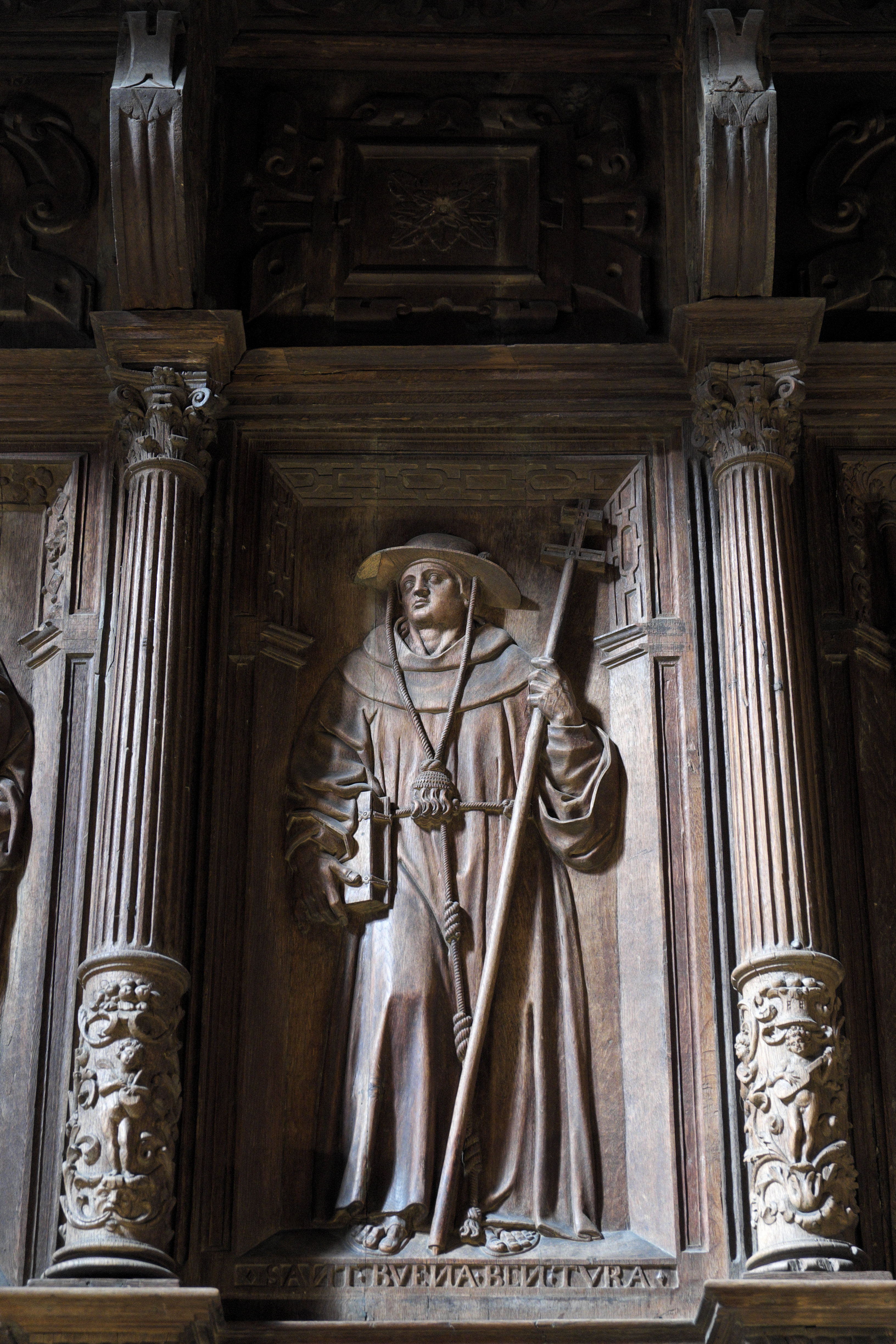 Museum der Kathedrale von Tortosa in der Provinz Tarragona (Katalonien/Spanien), Chorstuhl von Cristóbal de Salamanca, im Schlafsaal des ehemaligen Augustiner-Chorherrenstiftes, Darstellung: hl. Bonaventura